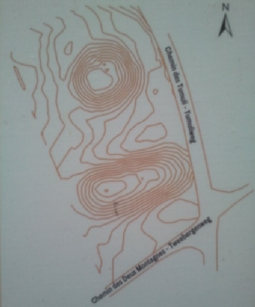 Dessin topographique des deux tumuli de la Forêt de Soignes.